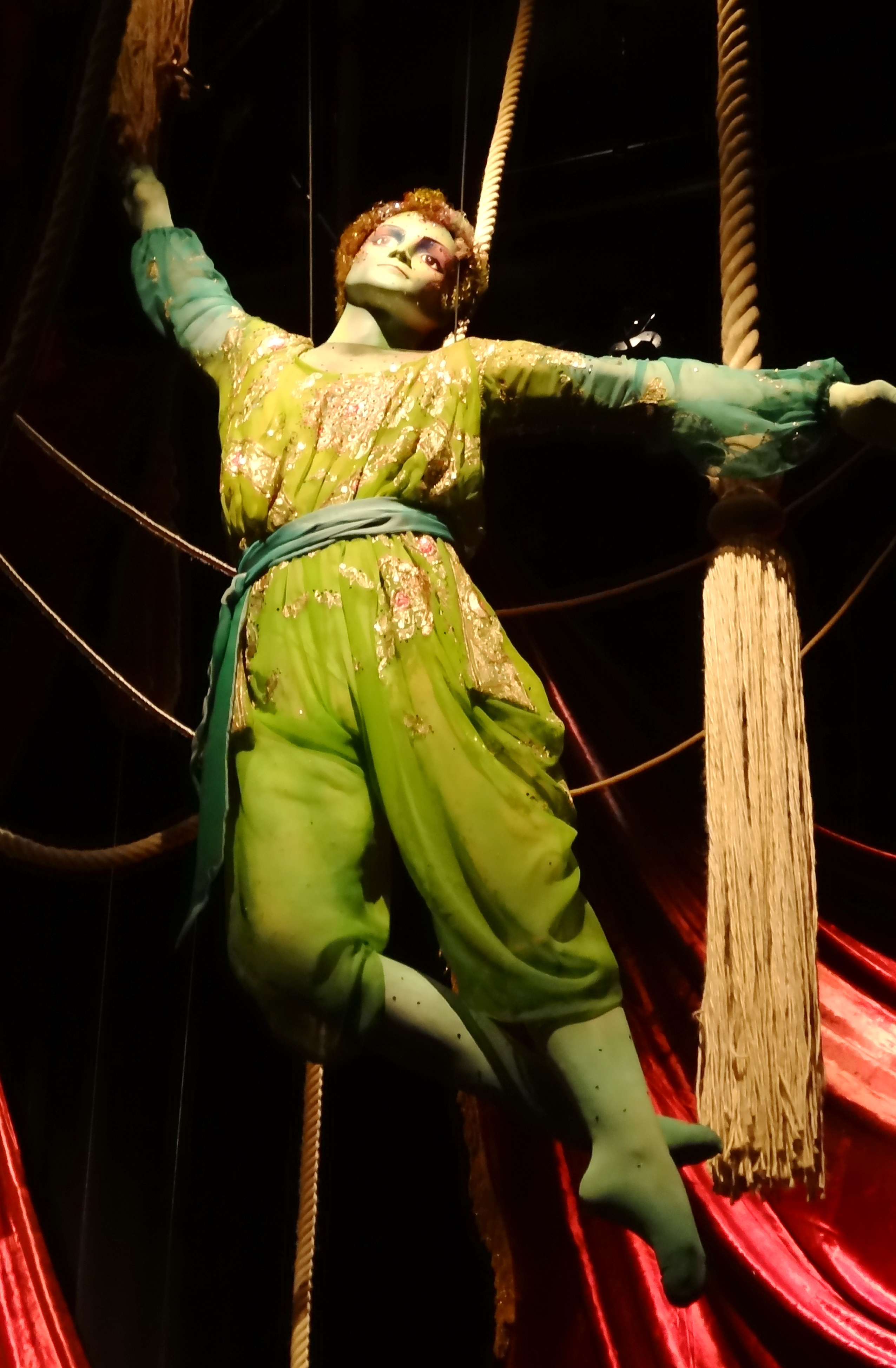 Galerie d’expositions temporaires - Centre national du costume de scène et de la scénographie - Moulins